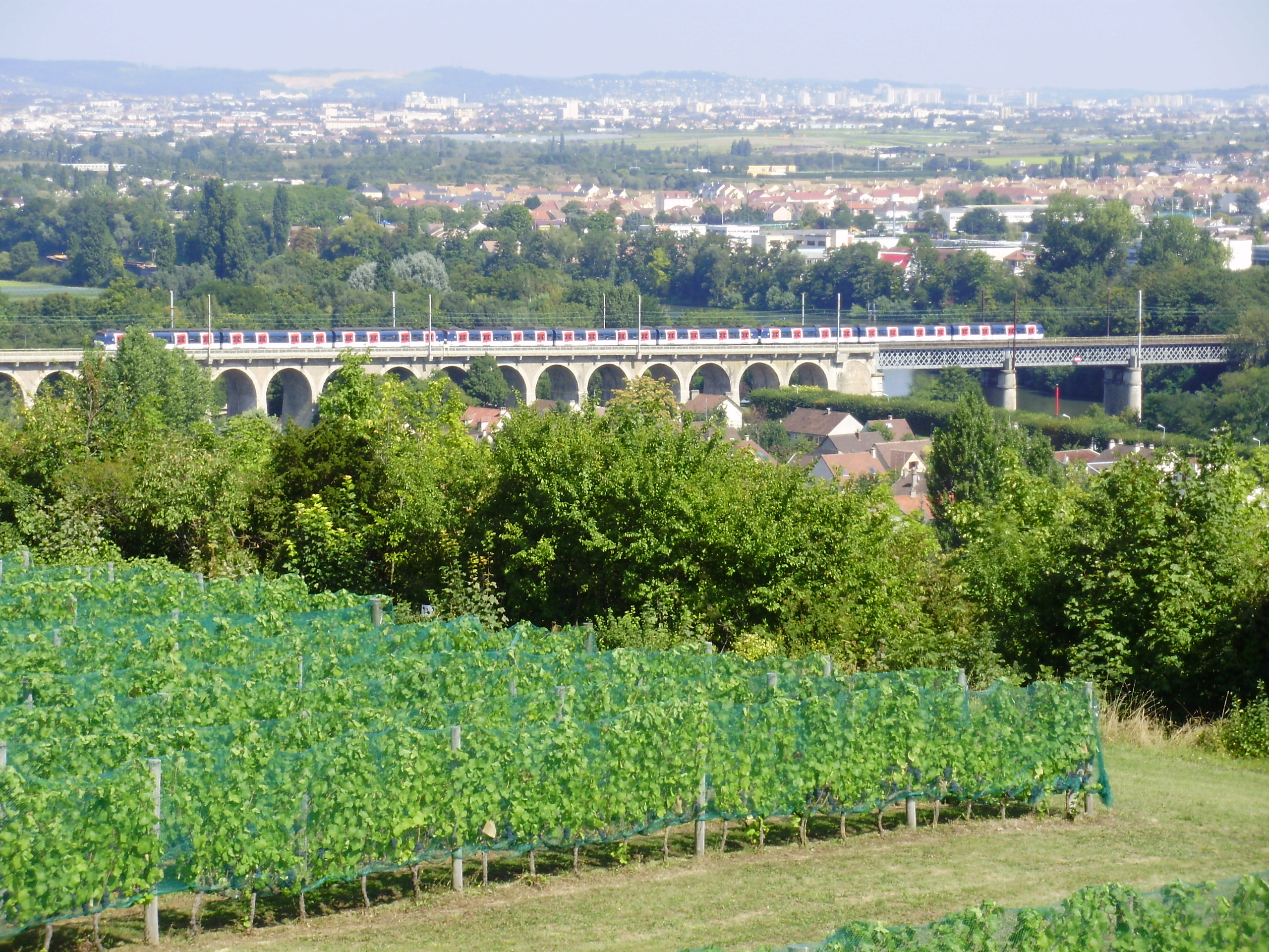 Viaduc ferroviaire du Pecq, Yvelines, France, vu depuis la petite terrasse de Saint-Germain-en-Laye